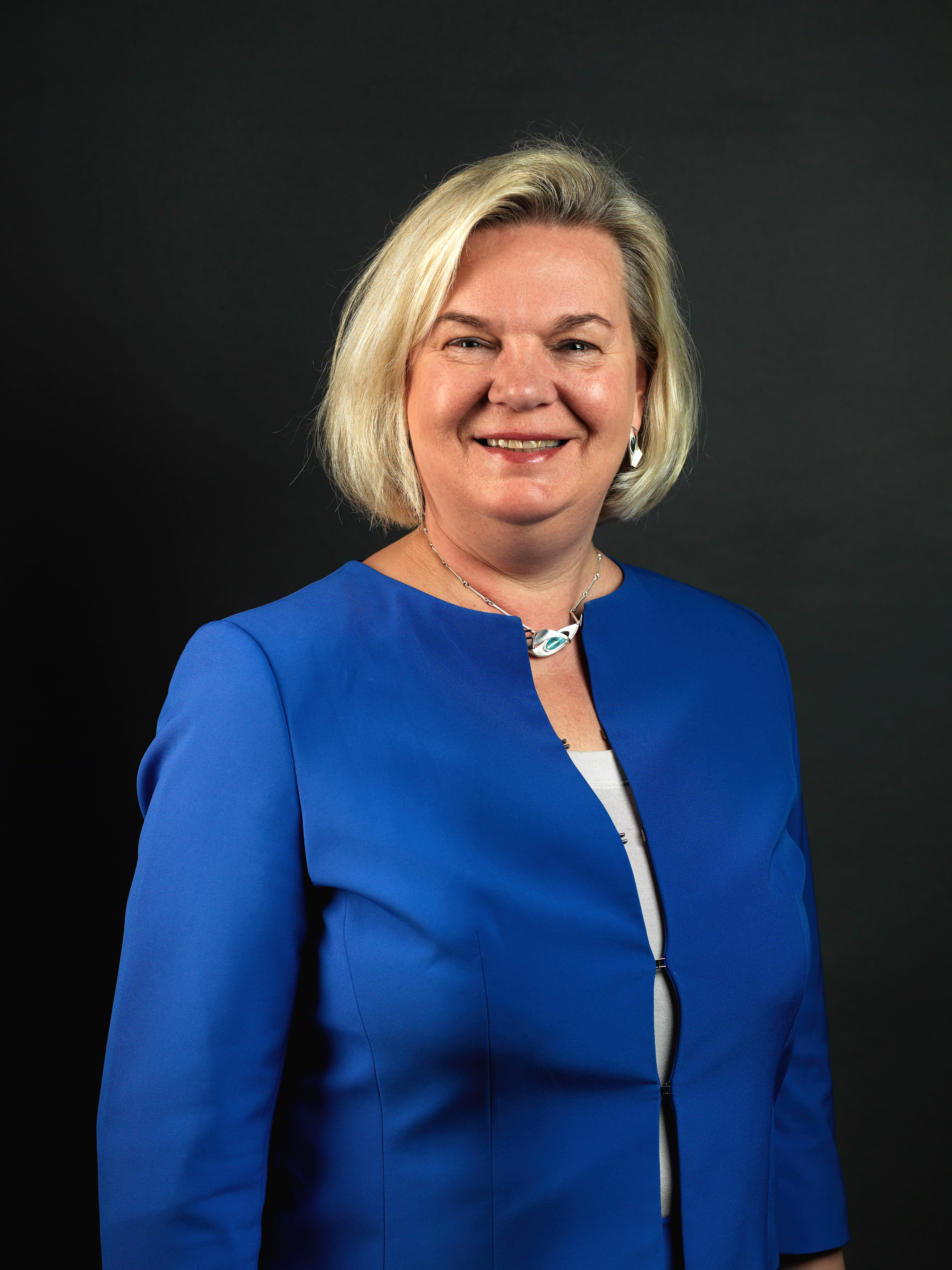 Personporträtt Gunvor Kronman